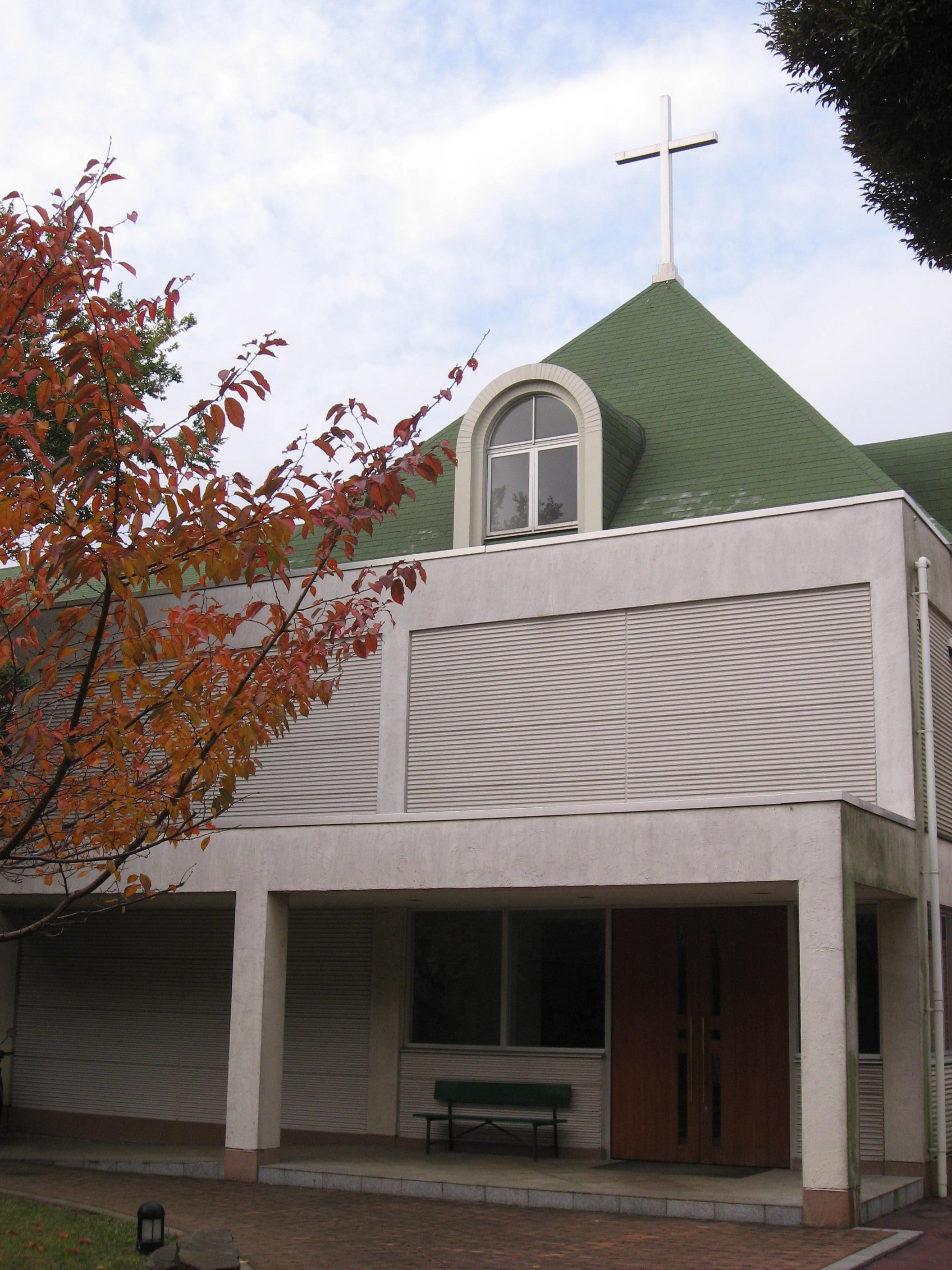 中央聖書神学校チャペル